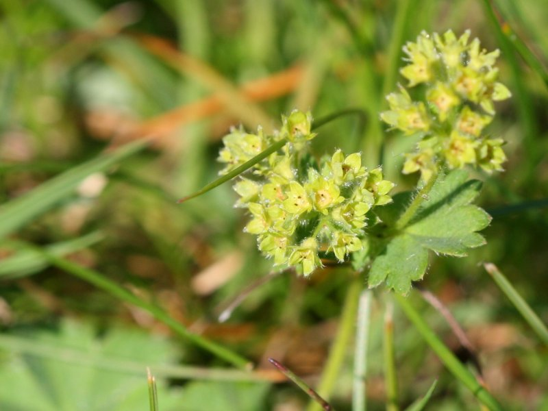 Bastard-Frauenmantel (Alchemilla glaucescens)